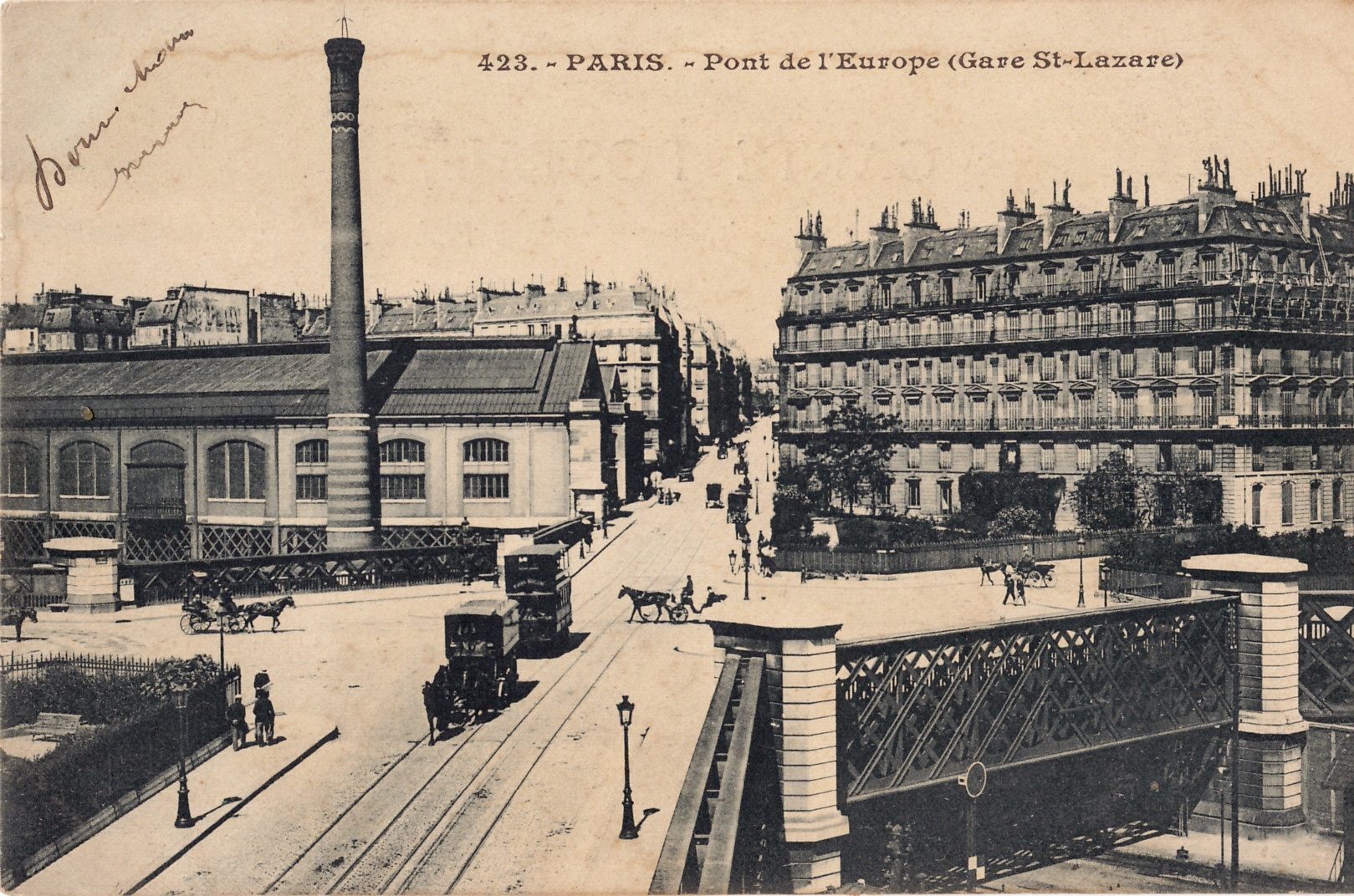 Carte postale ancienne sans mention d'éditeur :PARIS - Pont de l'Europe (Gare St-Lazare)